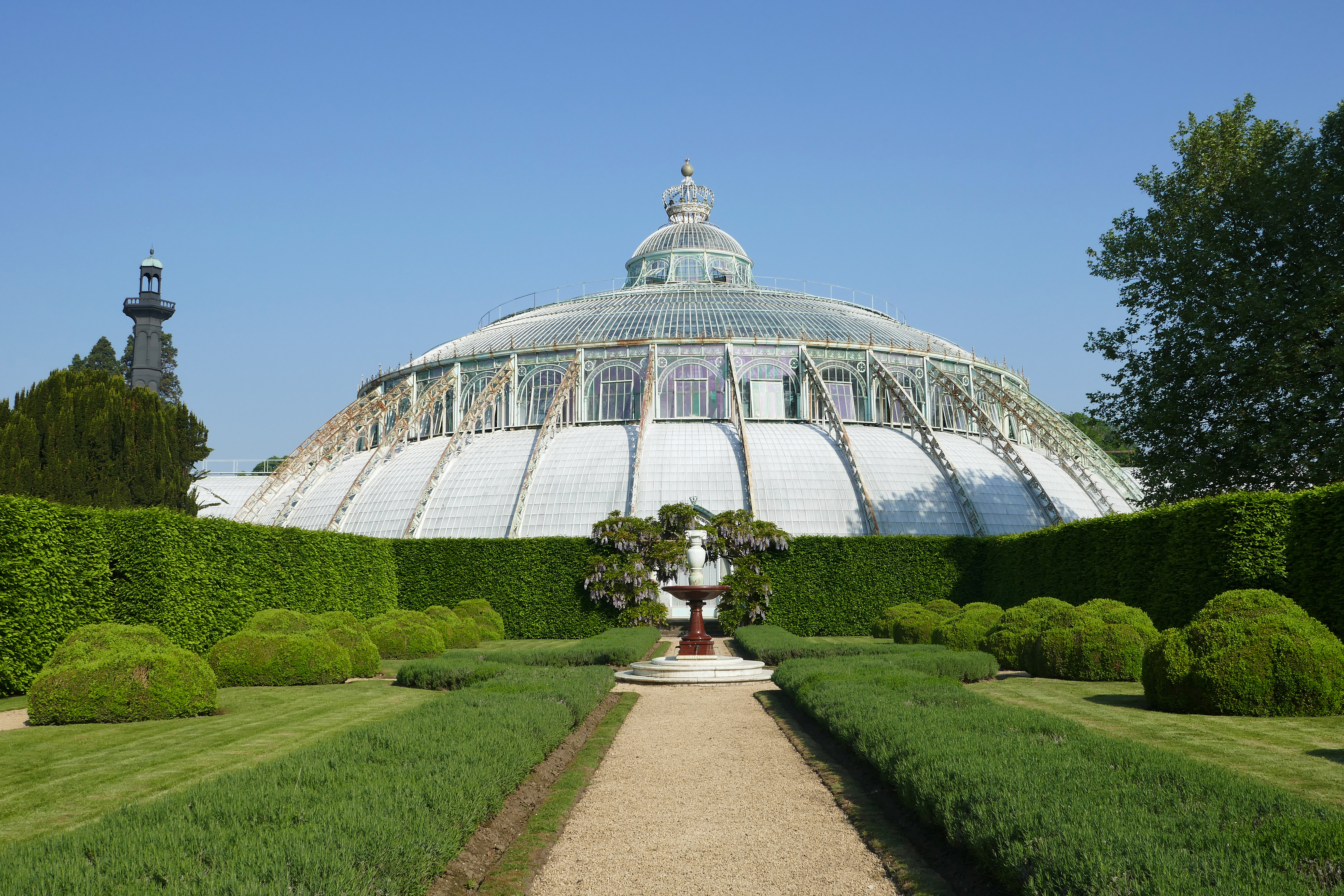 Serres royales de Laeken (Belgique), 2018.